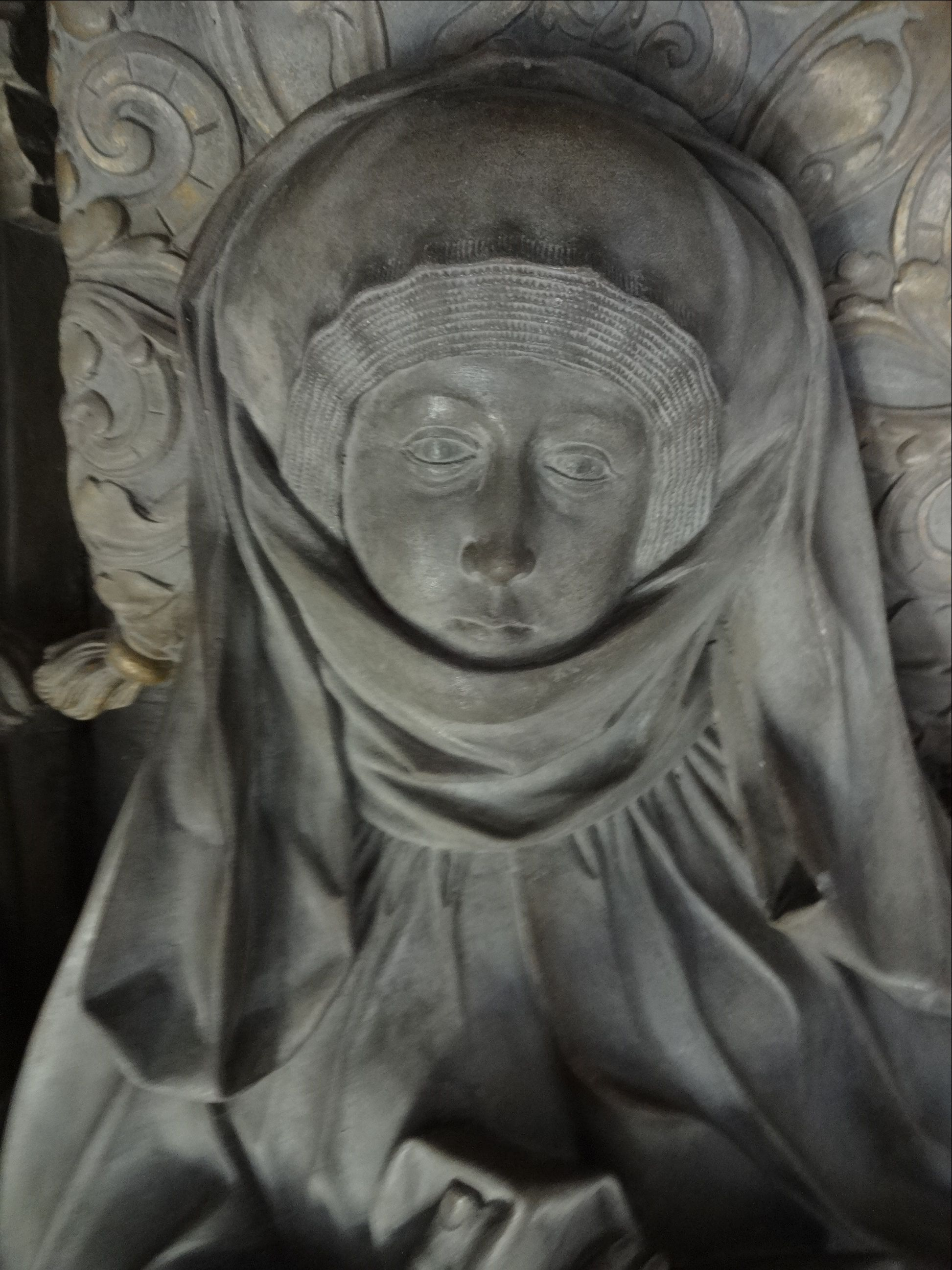 Grabmal Mechthild von der Pfalz (Mutter Eberhards) in der Tübinger Stiftskirche